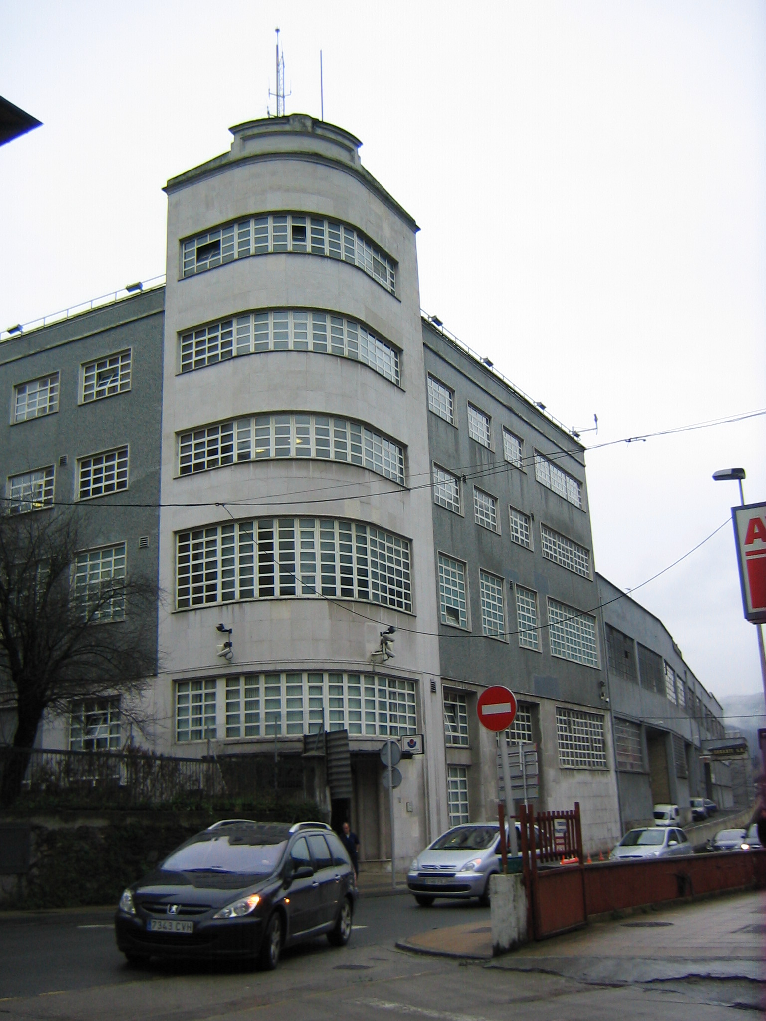 Fachada de las antiguas instalaciones de la empresa Lambretta en Eibar.